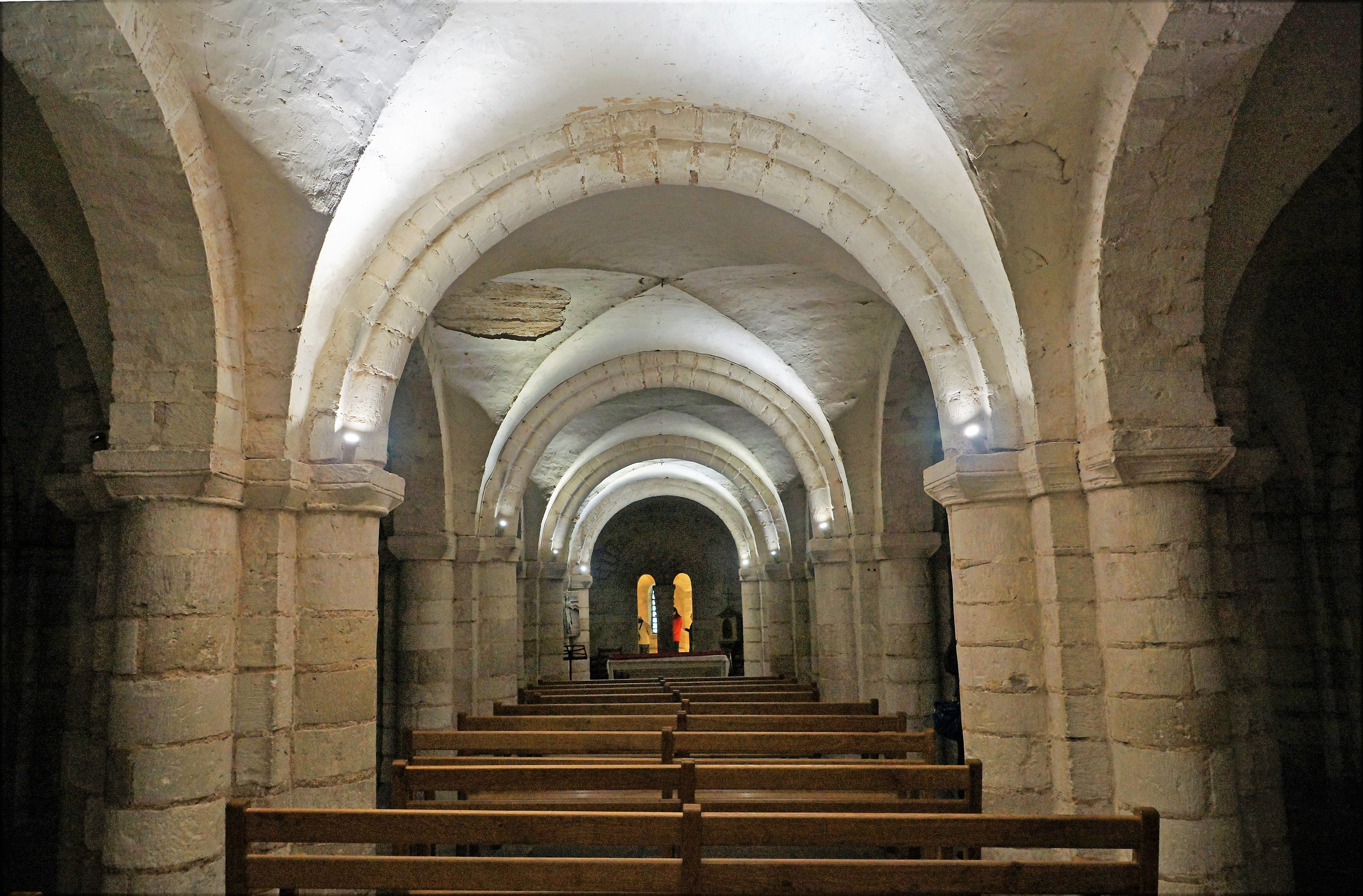 Cathédrale d'Auxerre, crypte